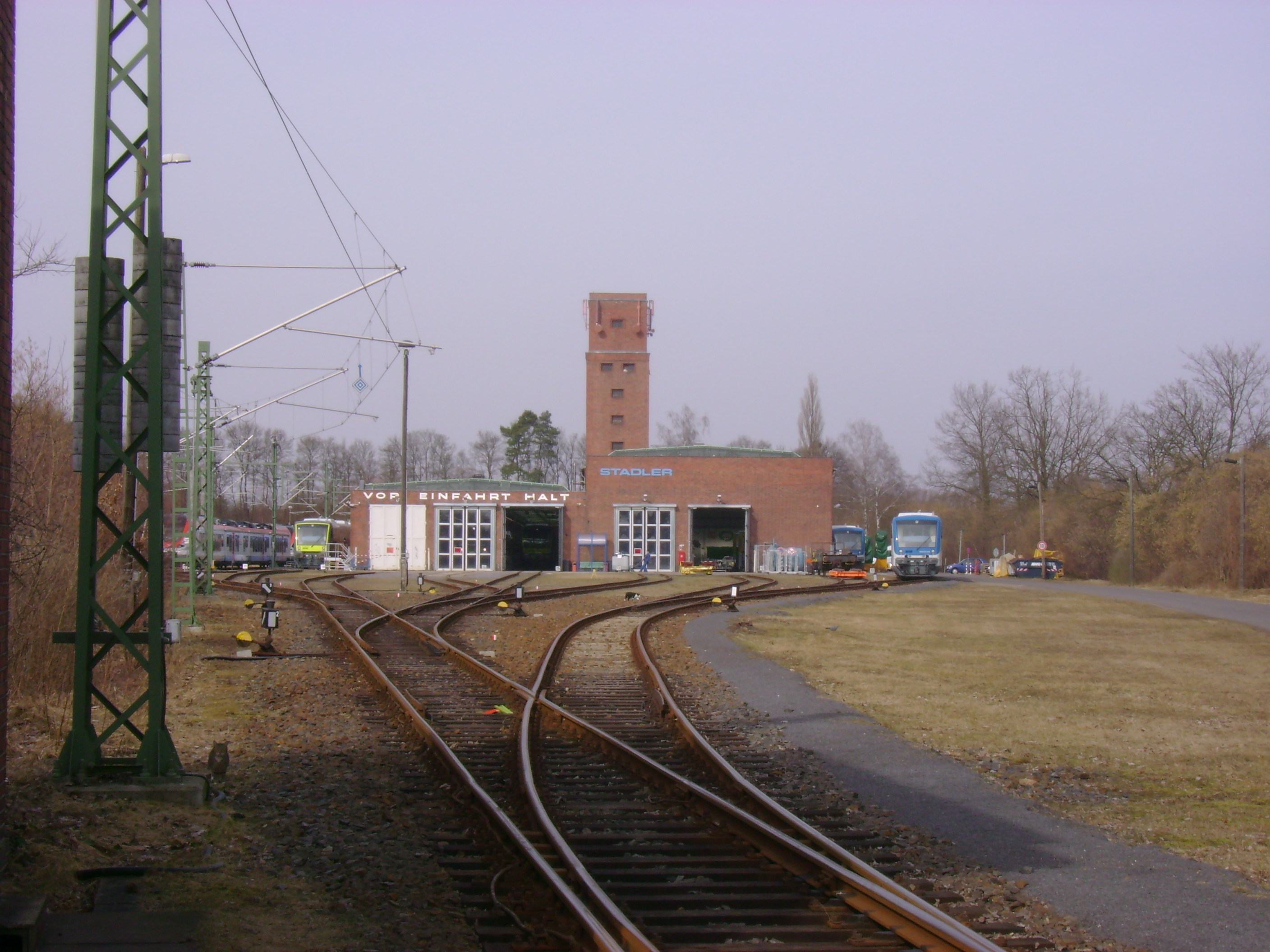 Ehemalige Triebwagenhalle der S-Bahn in Velten, Bötzower Straße. Im Jahre 2011 gehören die Hallen der schweizerischen Stadler Rail und sind der Stadler Pankow Gmbh mit Sitz in Berlin zugeordnet.